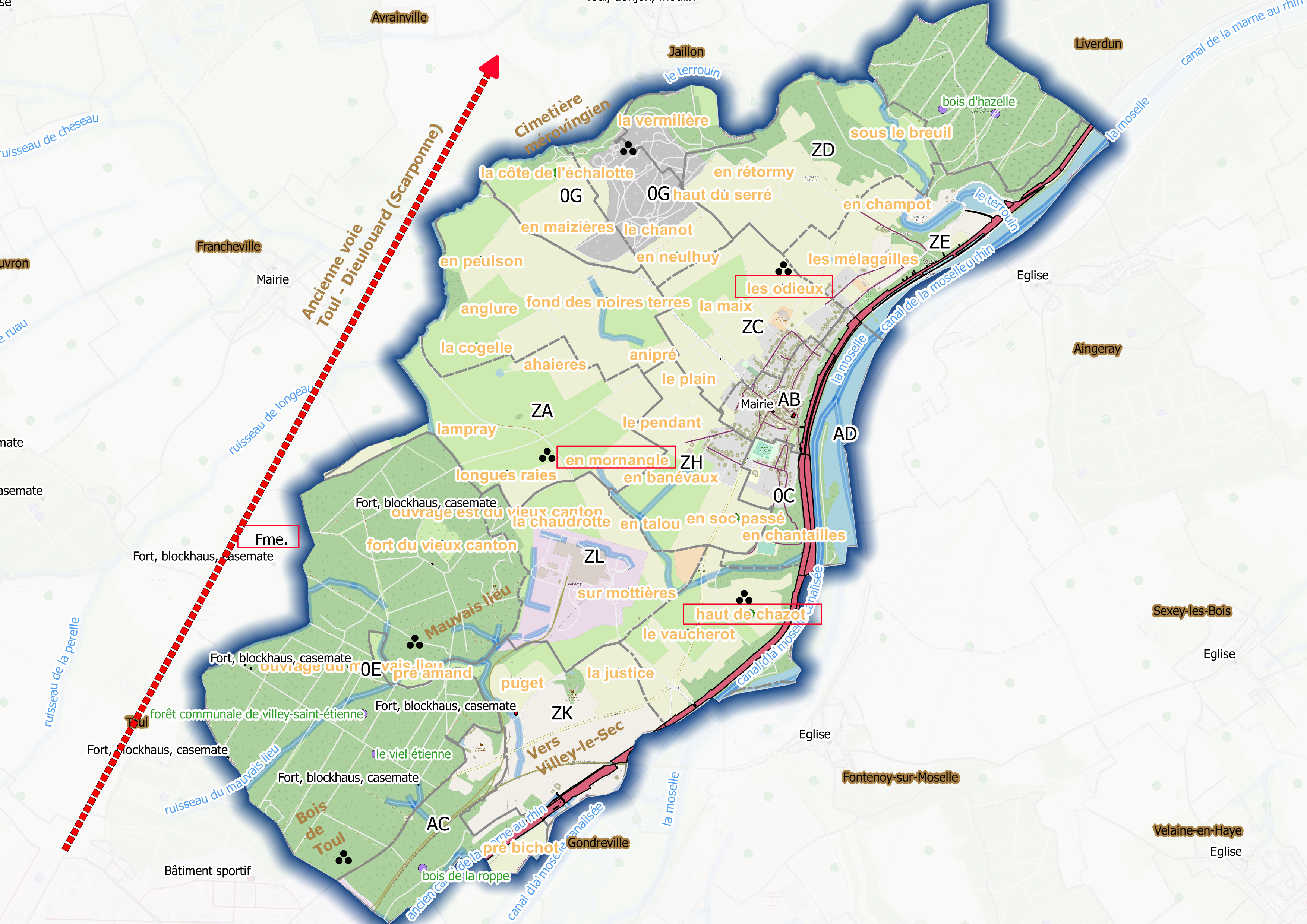 Géographie, histoire, hydrologie (OSM et Qgis) de la commune de Villey